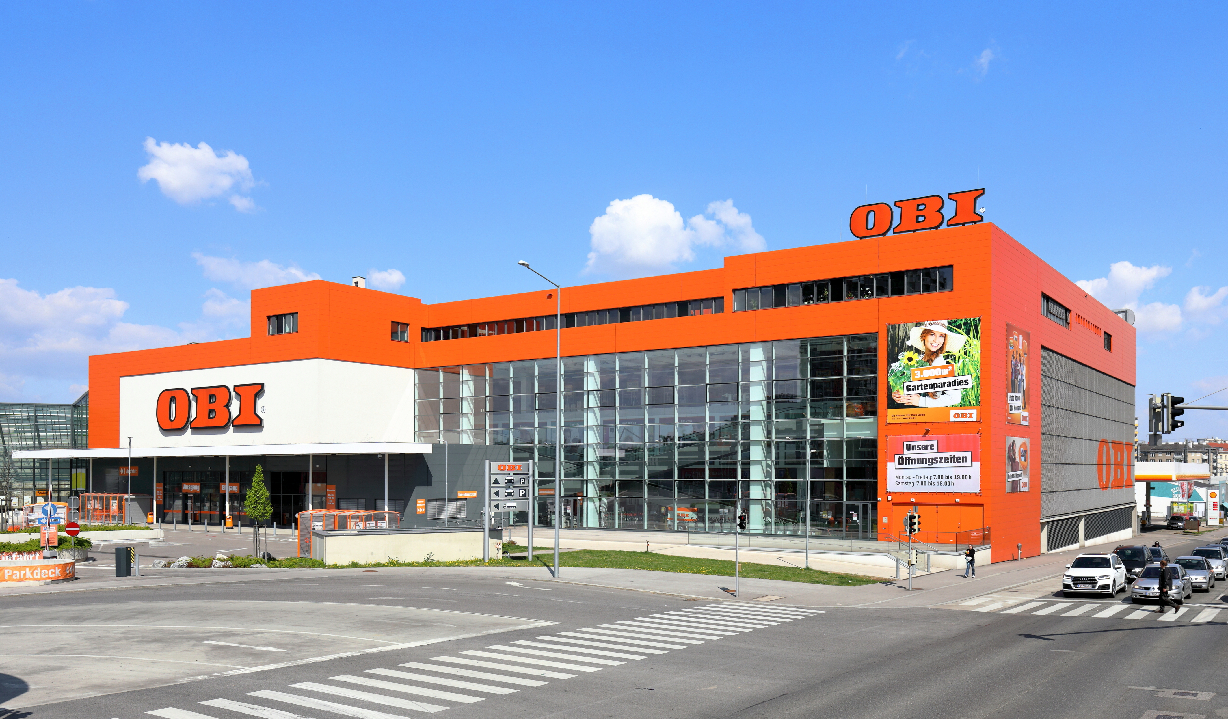 Der im September 2014 eröffnete OBI-Baumarkt an der Triester Straße 10 im 10. Wiener Gemeindebezirk Favoriten. Die Planung des Baumarktes mit rd. 10.000 m2 Verkaufsfläche auf zwei Geschossen und einem 3.000 m2 großen Gartencenter sowie 250 Parkplätzen hatte das Architektenbüro Marschalek & Marschalek inne. Errichtet wurde er von dem OBI-Franchisepartner Sochor um rd. 30 Millionen Euro, wobei die Finanzierung durch die Hypo Immobilien Leasing Vorarlberg erfolgte.